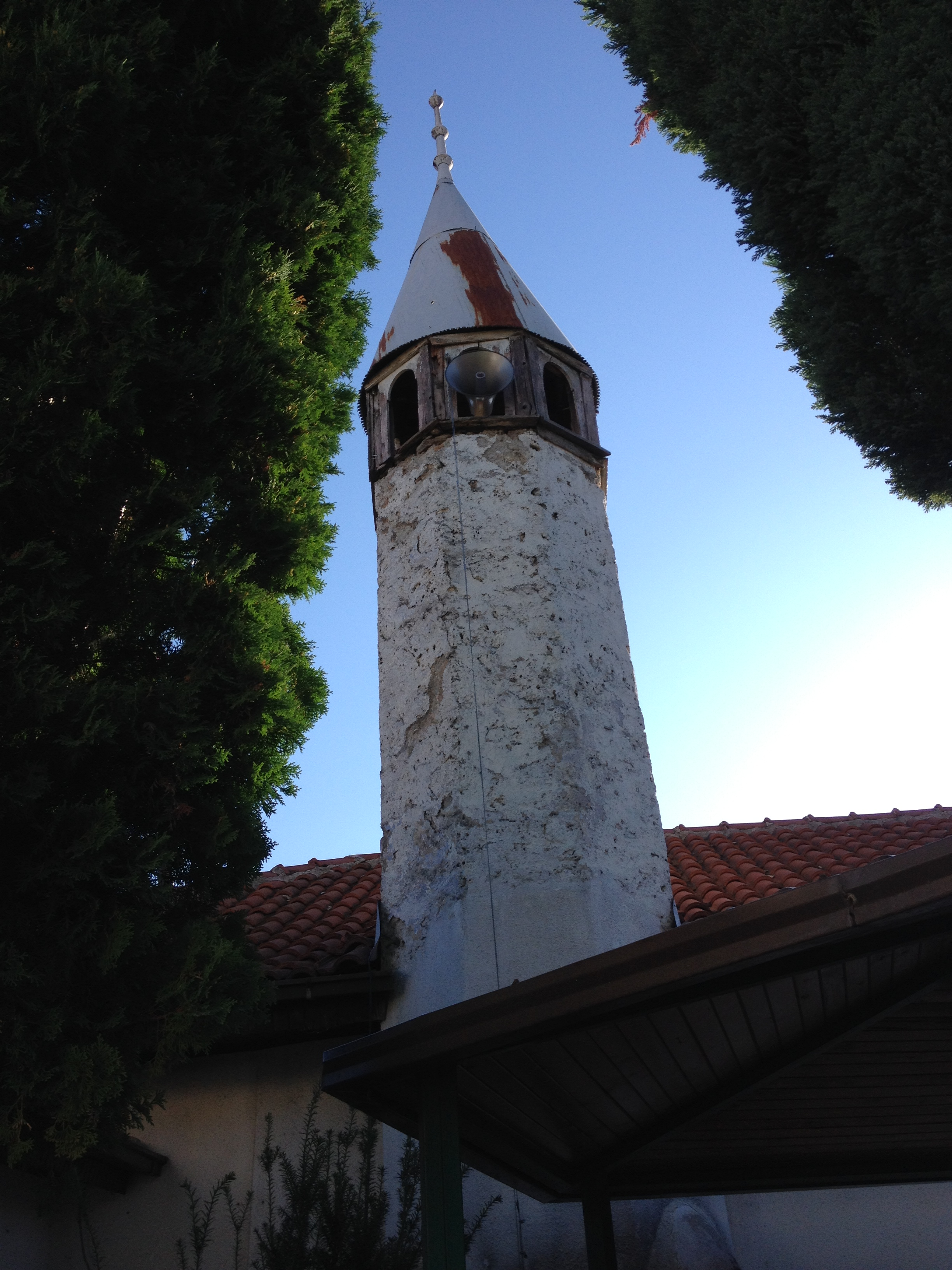 Die Kara-Bey-Moschee in Ohrid, Mazedonien